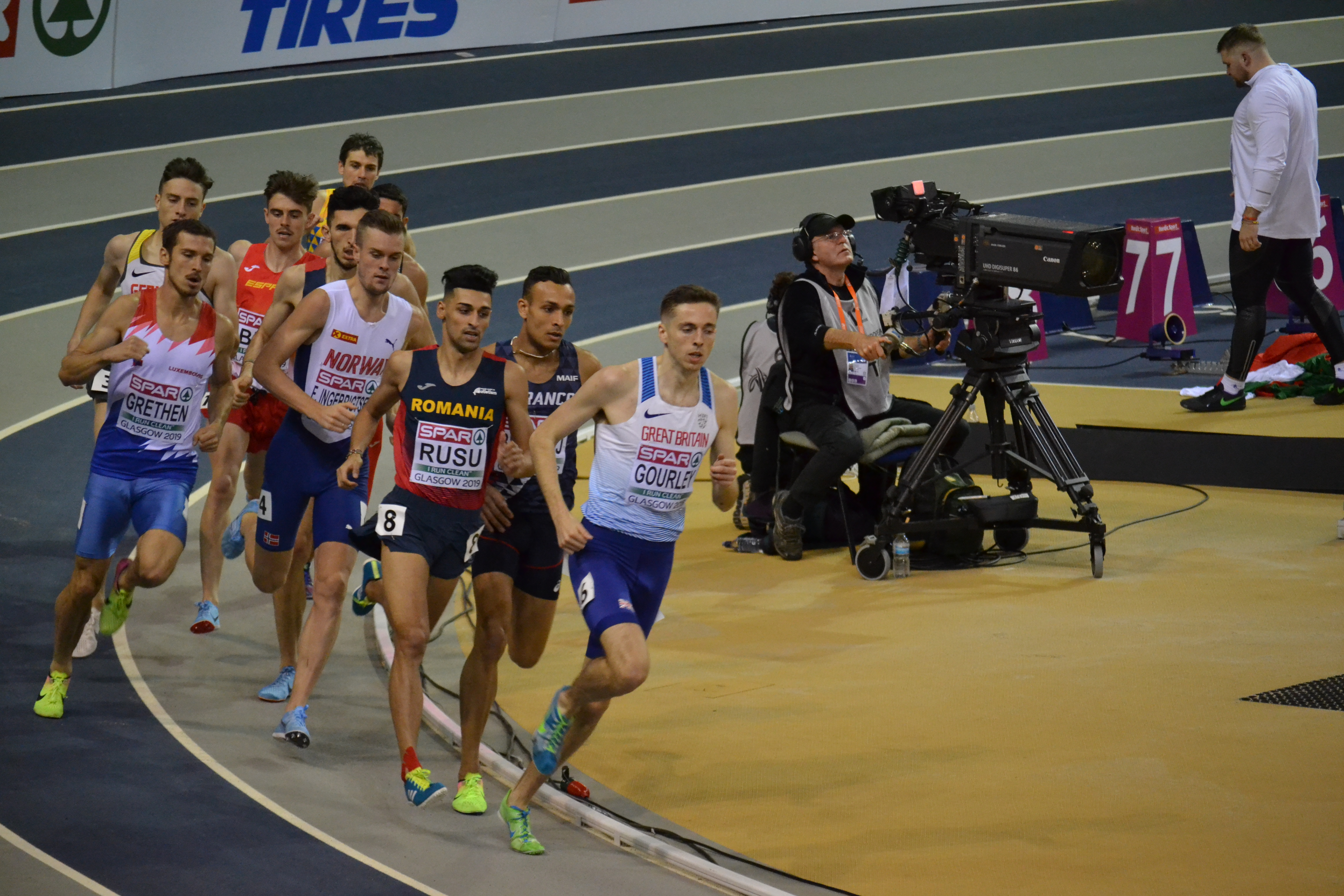 Mens 1500m